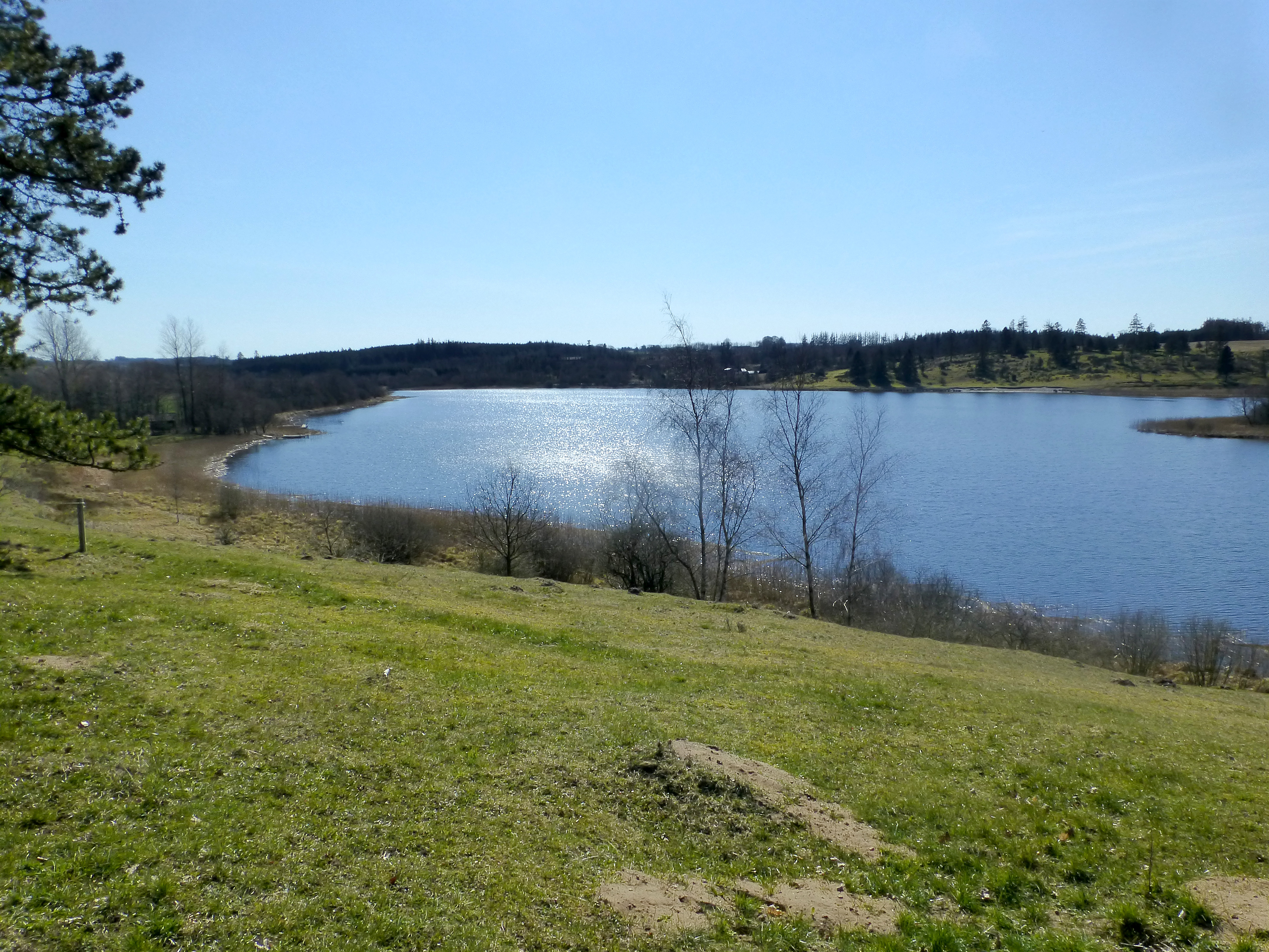 Stigsholm Sø set mod syd